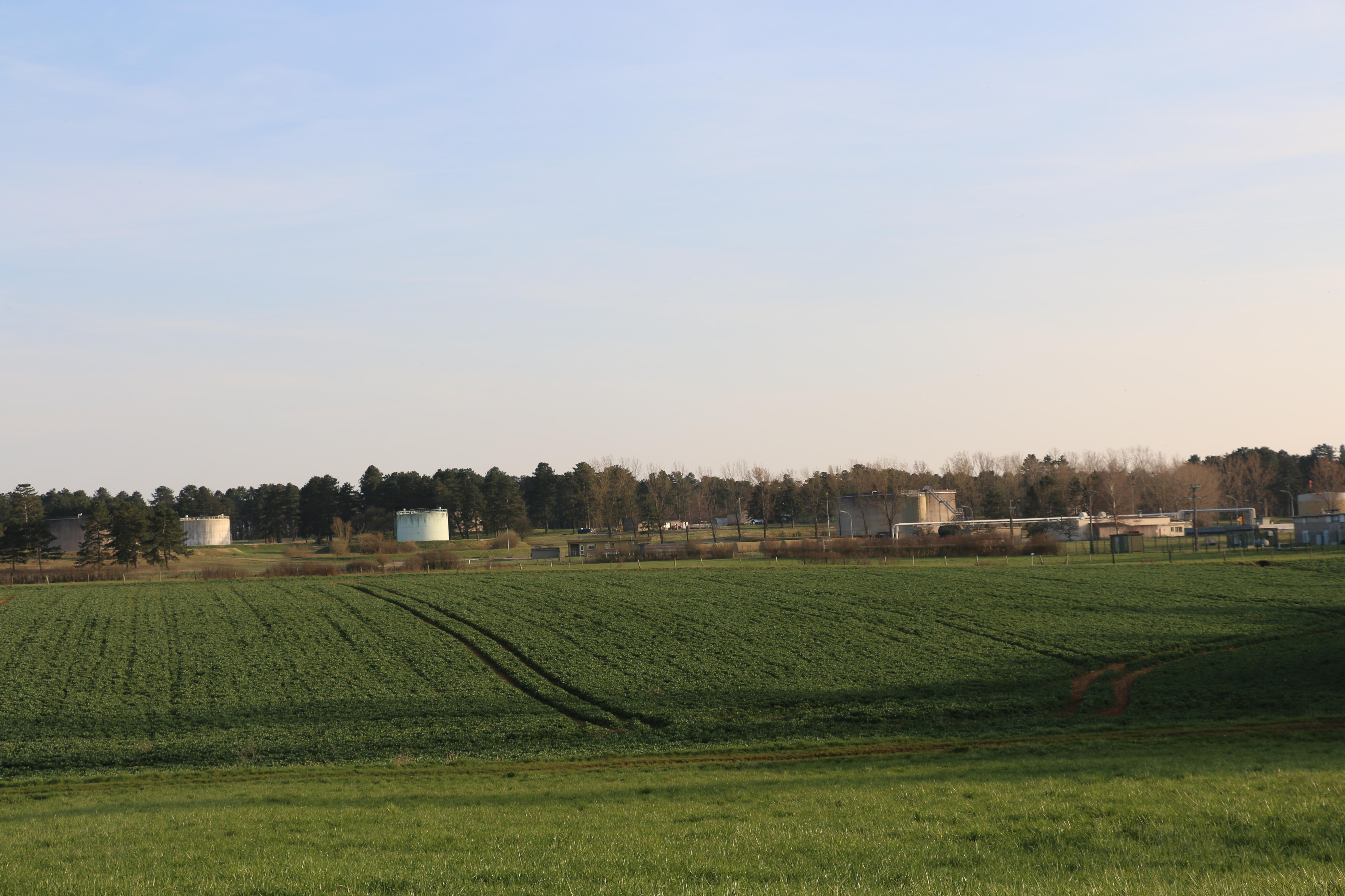 Saint-Bausant, Tanklager.